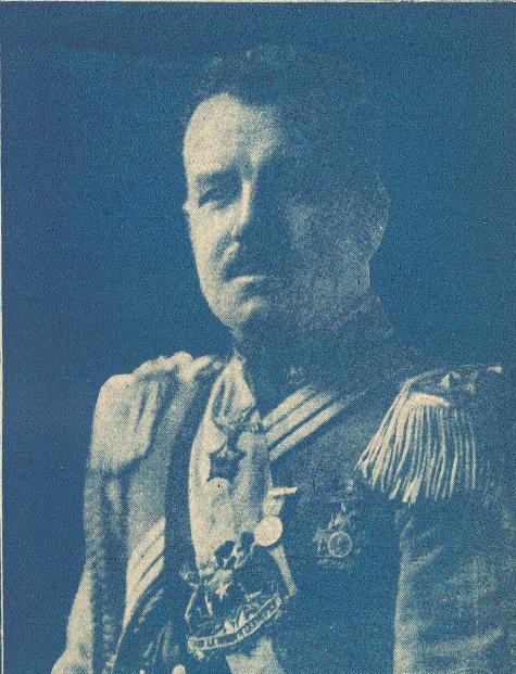 Fotografía de Carlos Ibáñez del Campo, Presidente de Chile (1927-1931; 1952-1958)